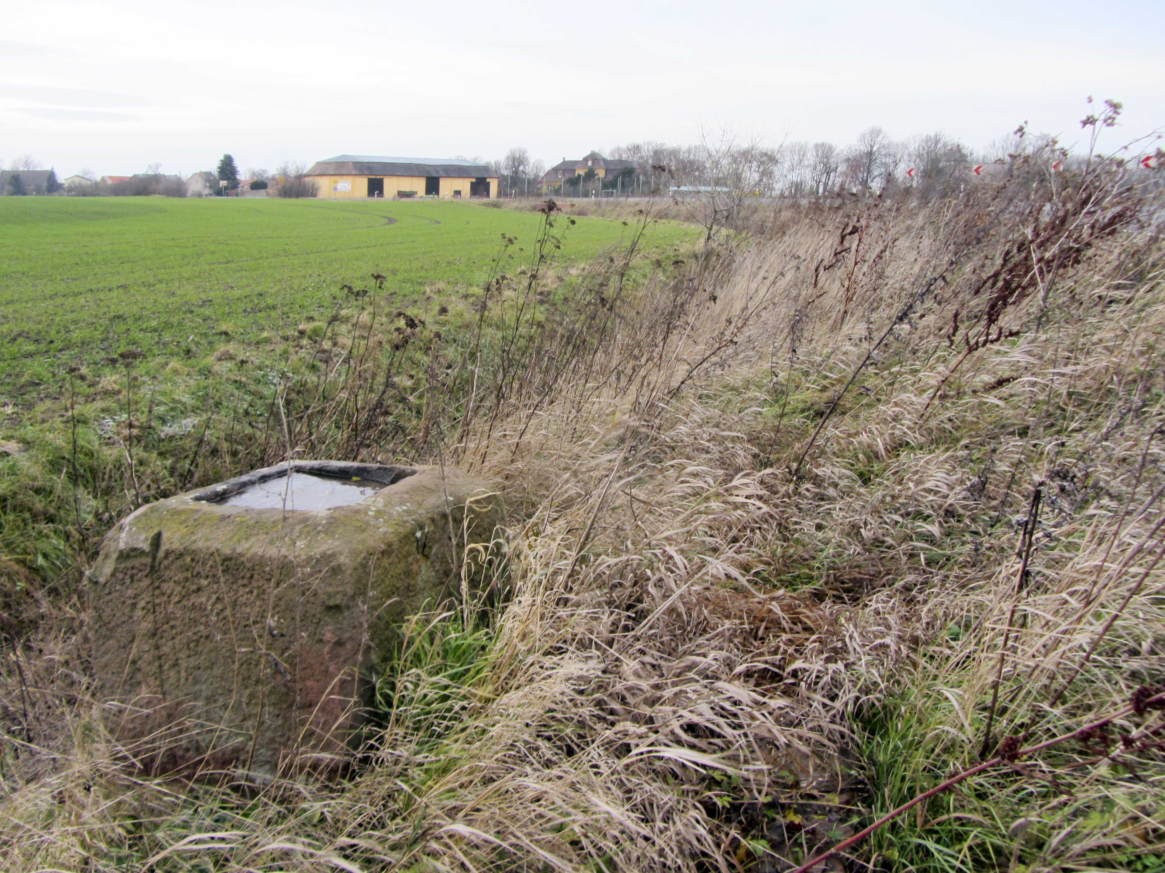 Sockel eines Preußischen Ganzmeilenobelisk an der L 50 bei Garsena